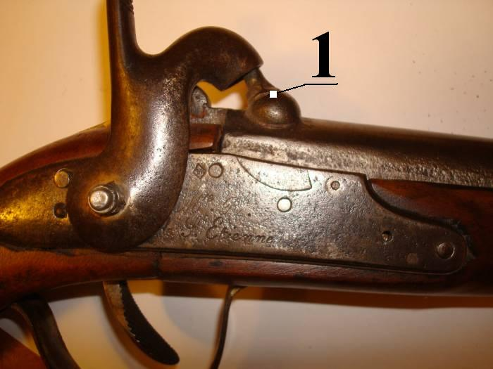 Photo d'une platine à percussion d'arme à feu ancienne.